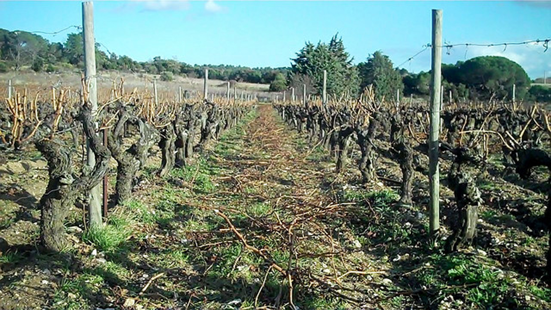 Vignoble taillé en gobelet